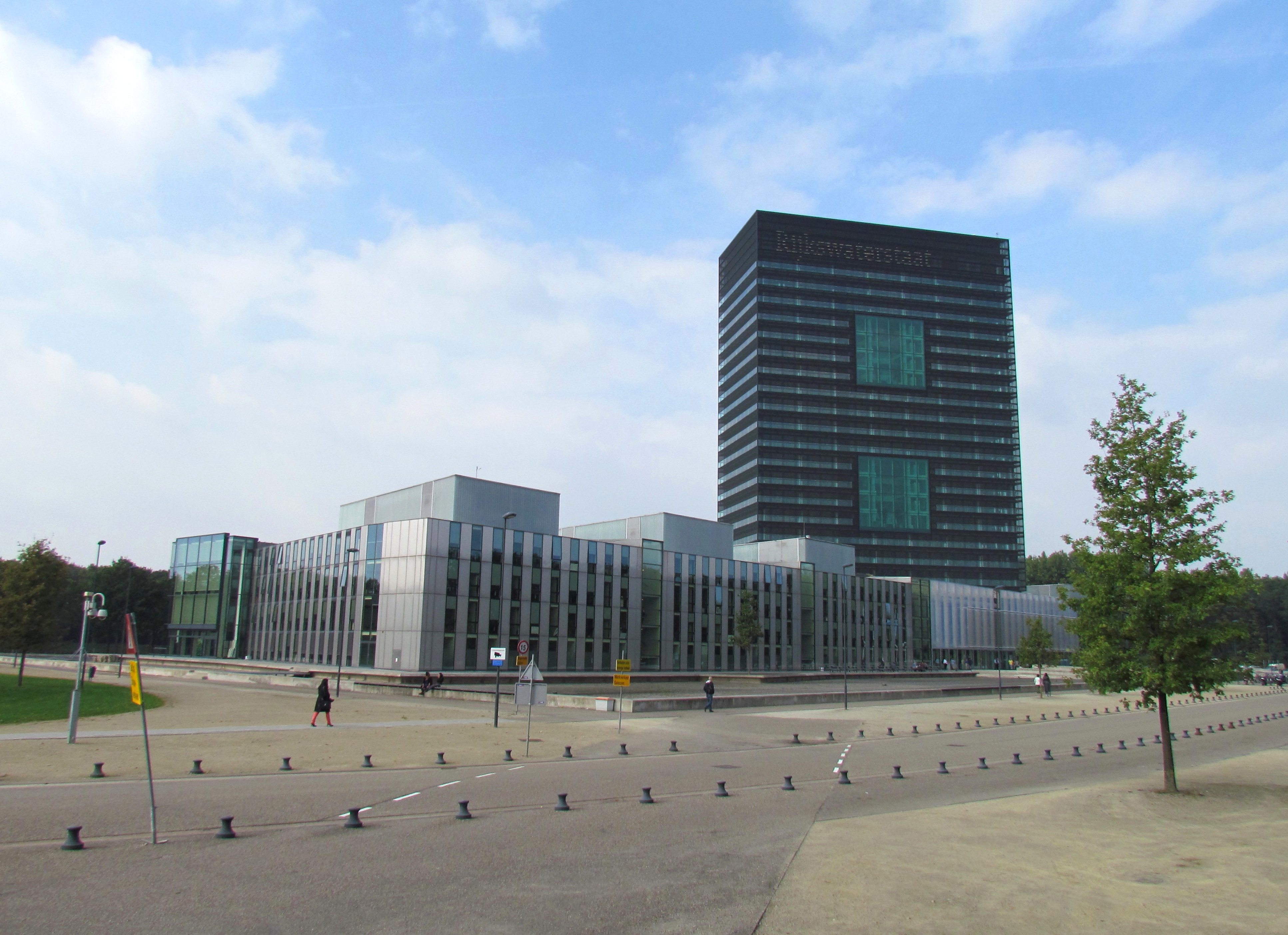 Kantoorgebouw 'Westraven' van Rijkswaterstaat in Utrecht